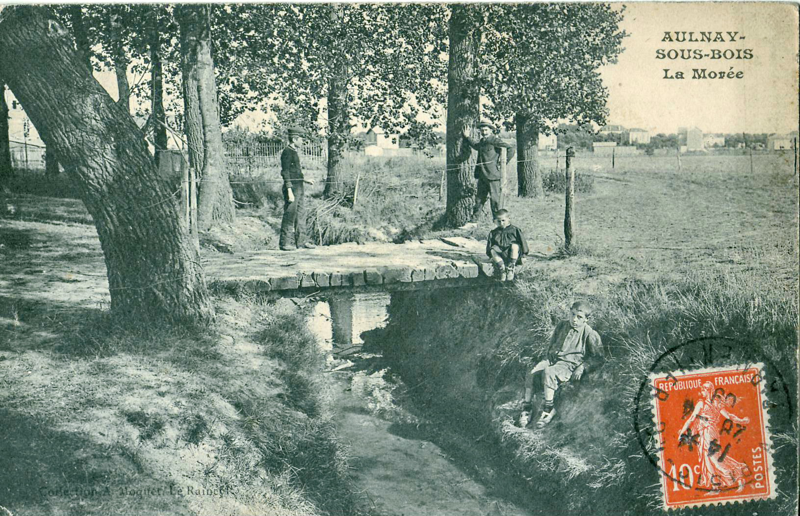 Carte postale ancienne éditée par Moquet AULNAY-SOUS-BOIS : La Morée